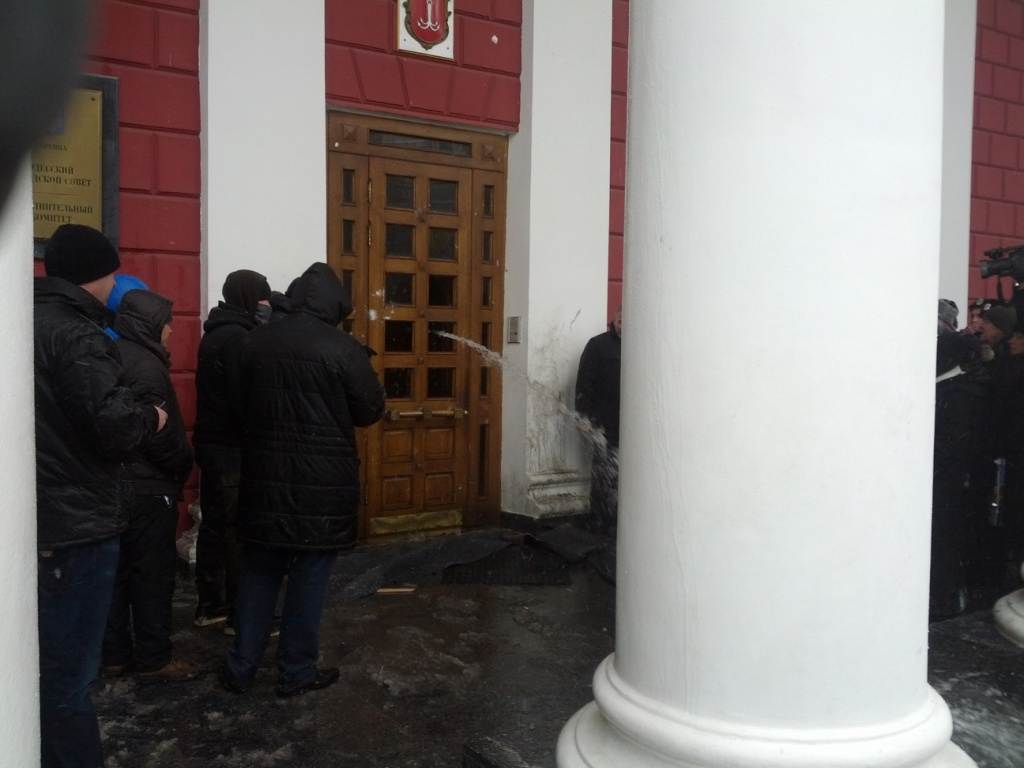 Штурм Одесского городского совета